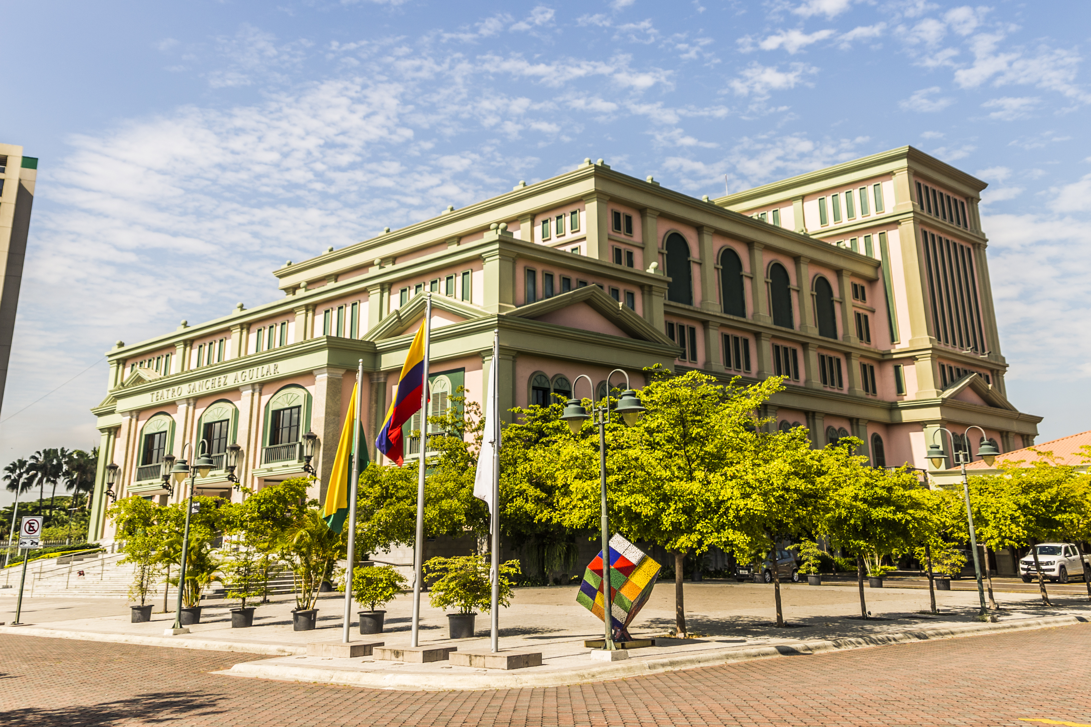 Fachada del Teatro Sánchez Aguilar, visto desde la plazoleta.